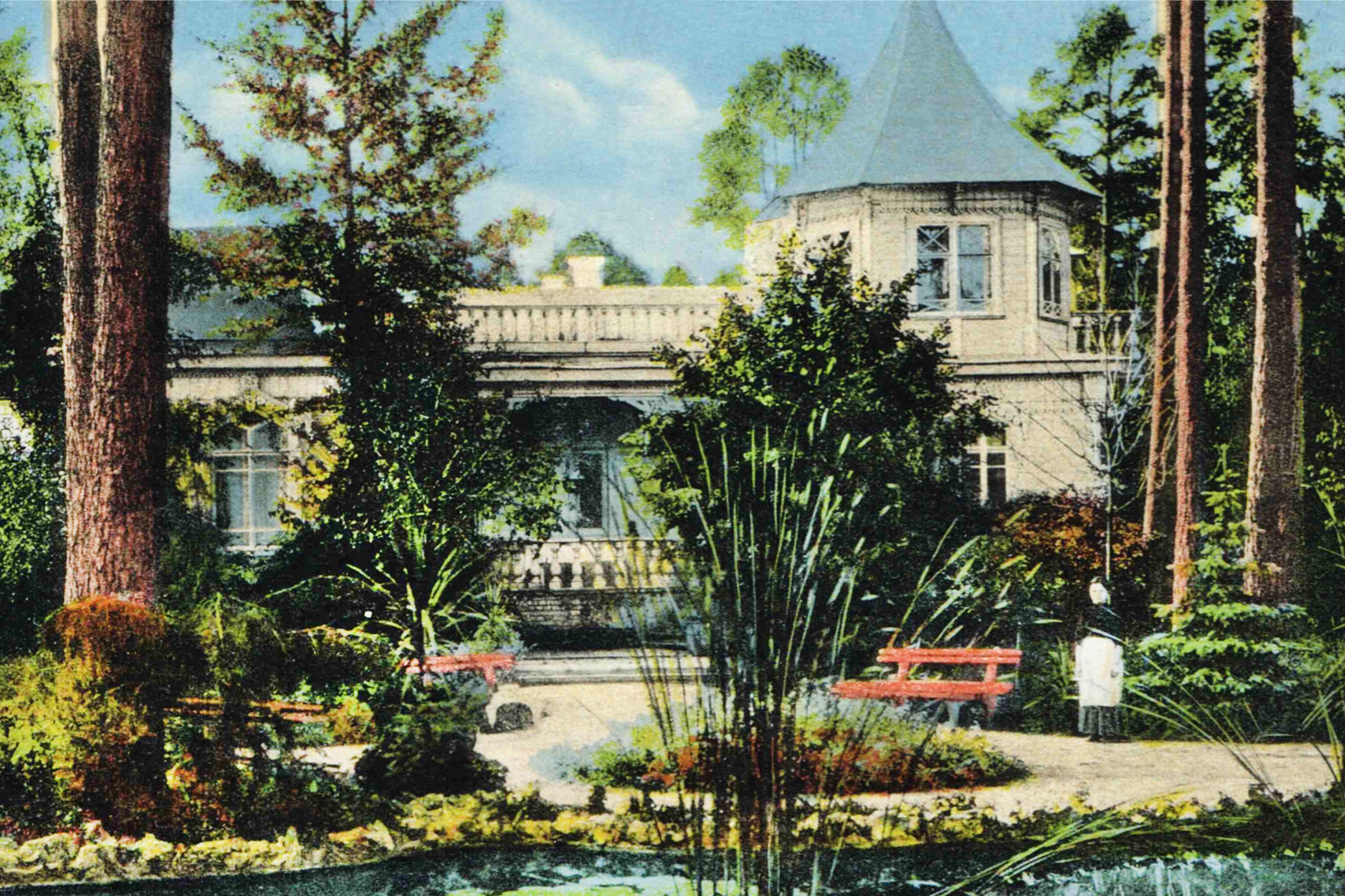 Дача Лесишина на Святошині